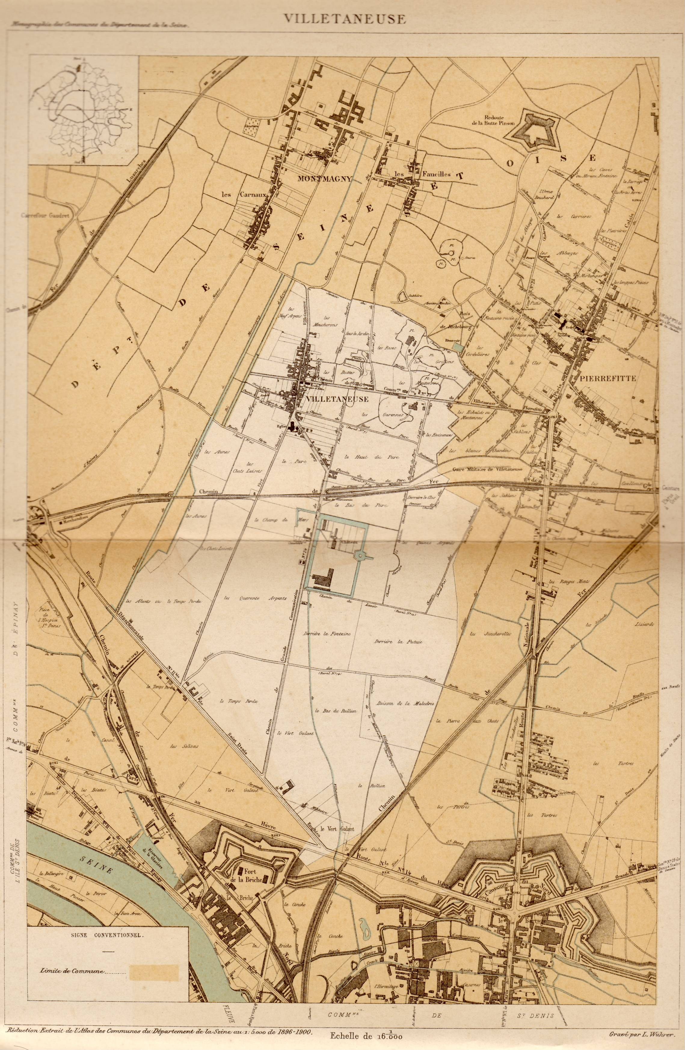 Plan de Villetaneuse en 1896 reproduite dans la monographie sur Villetaneuse de l'Etat des communes de la Seine à la fin du XIXe siècle (Montévrain, 1896)